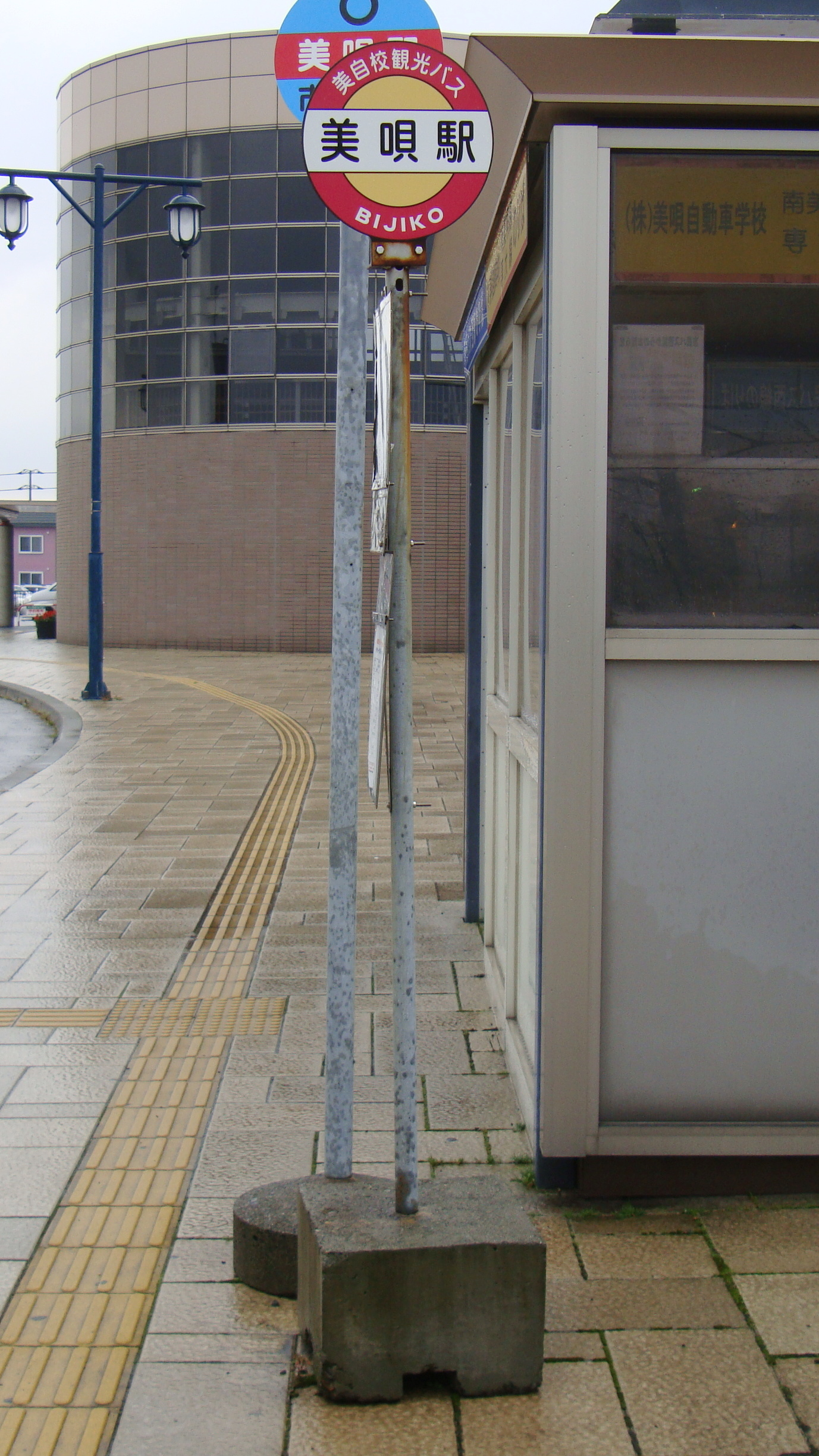 "Bibai eki" bus stop